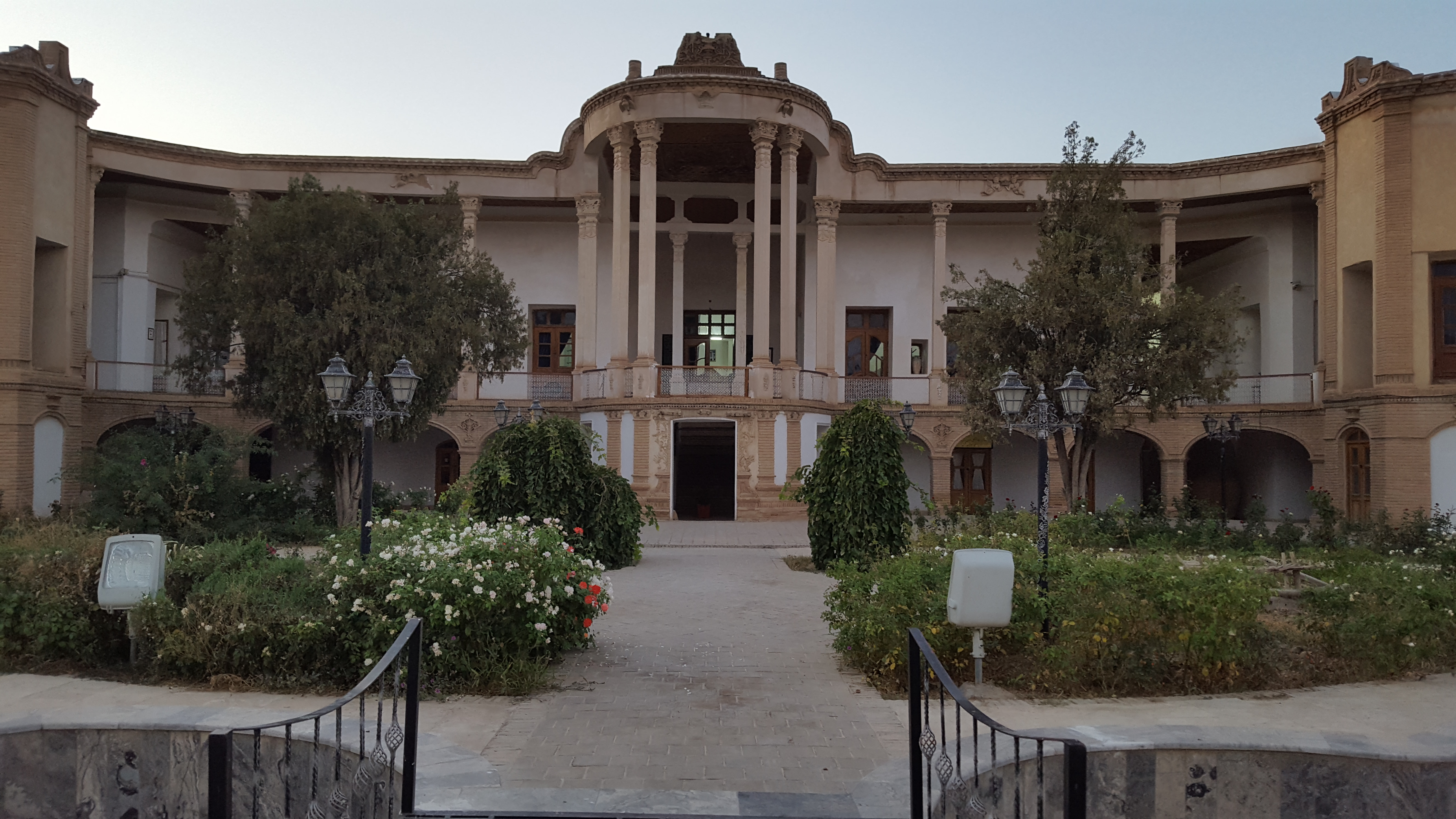 قلعه سالار محتشم خمین